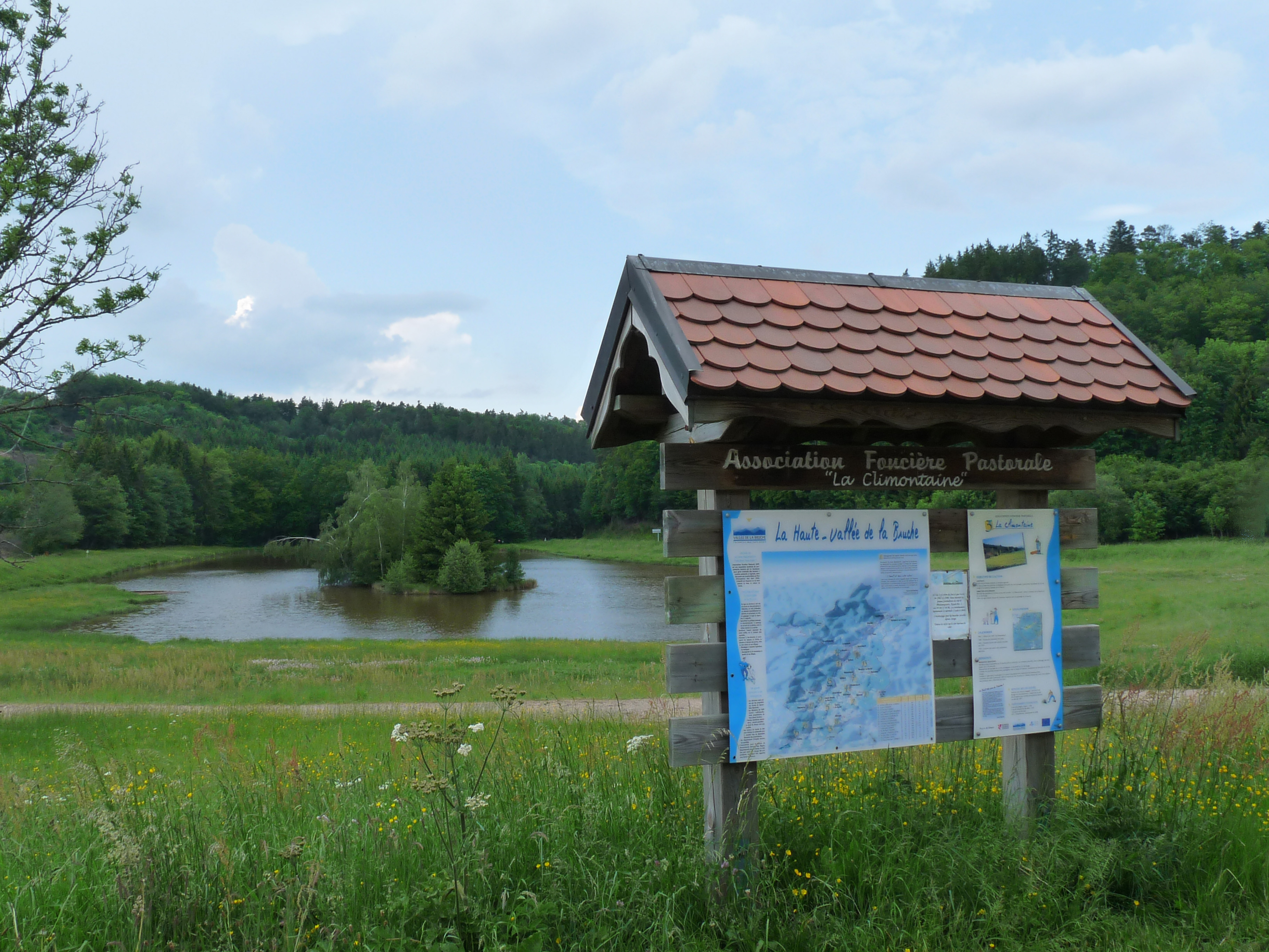 Etang du col de Steige (Bas-Rhin)